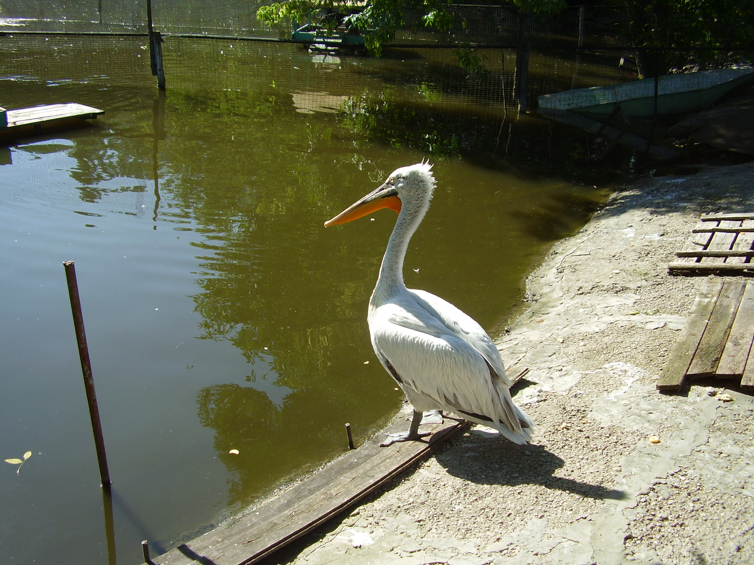 Липецк, пеликан у пруда в зоопарке